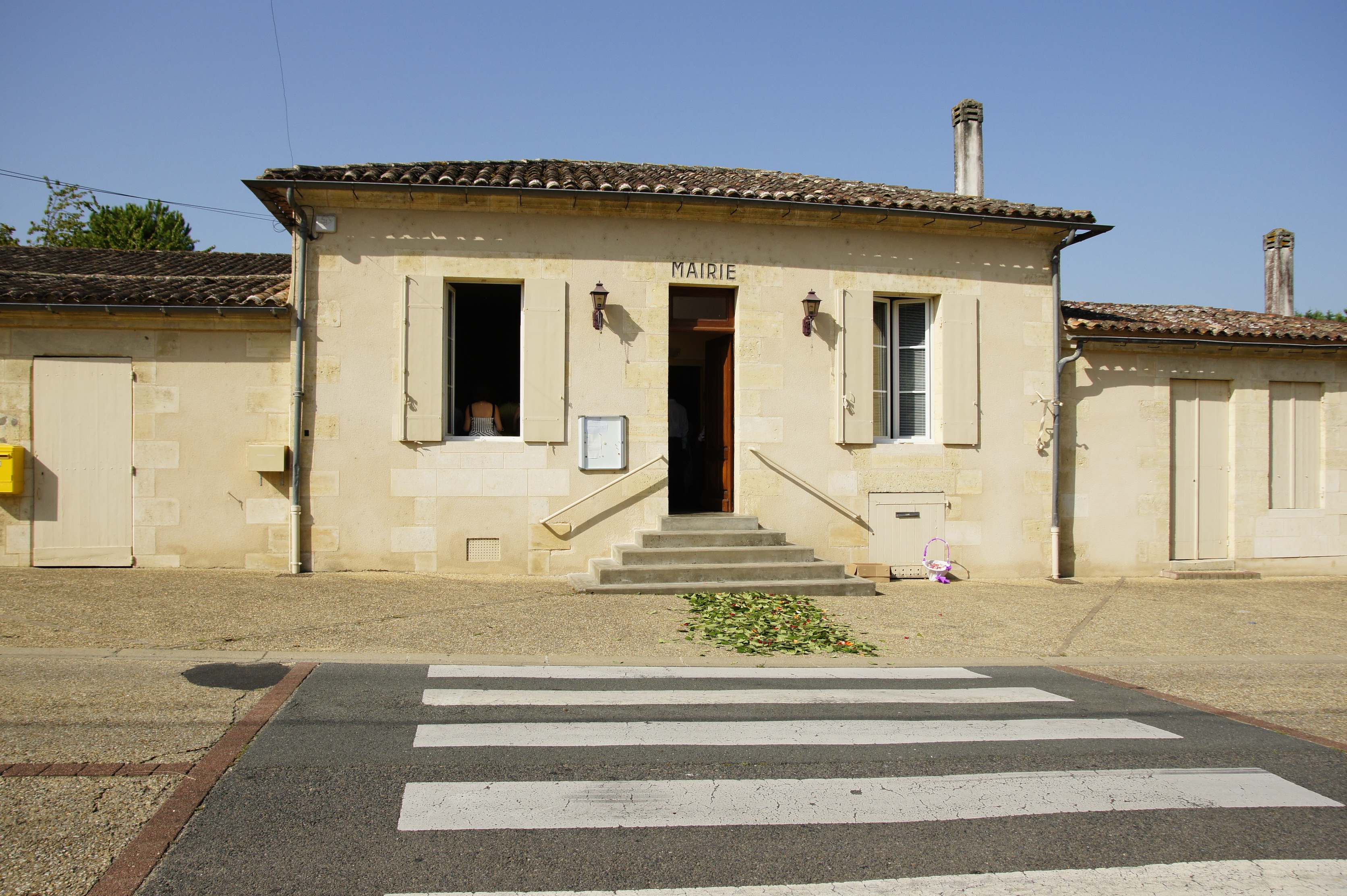 Mairie de Sainte-Radegonde (Gironde)